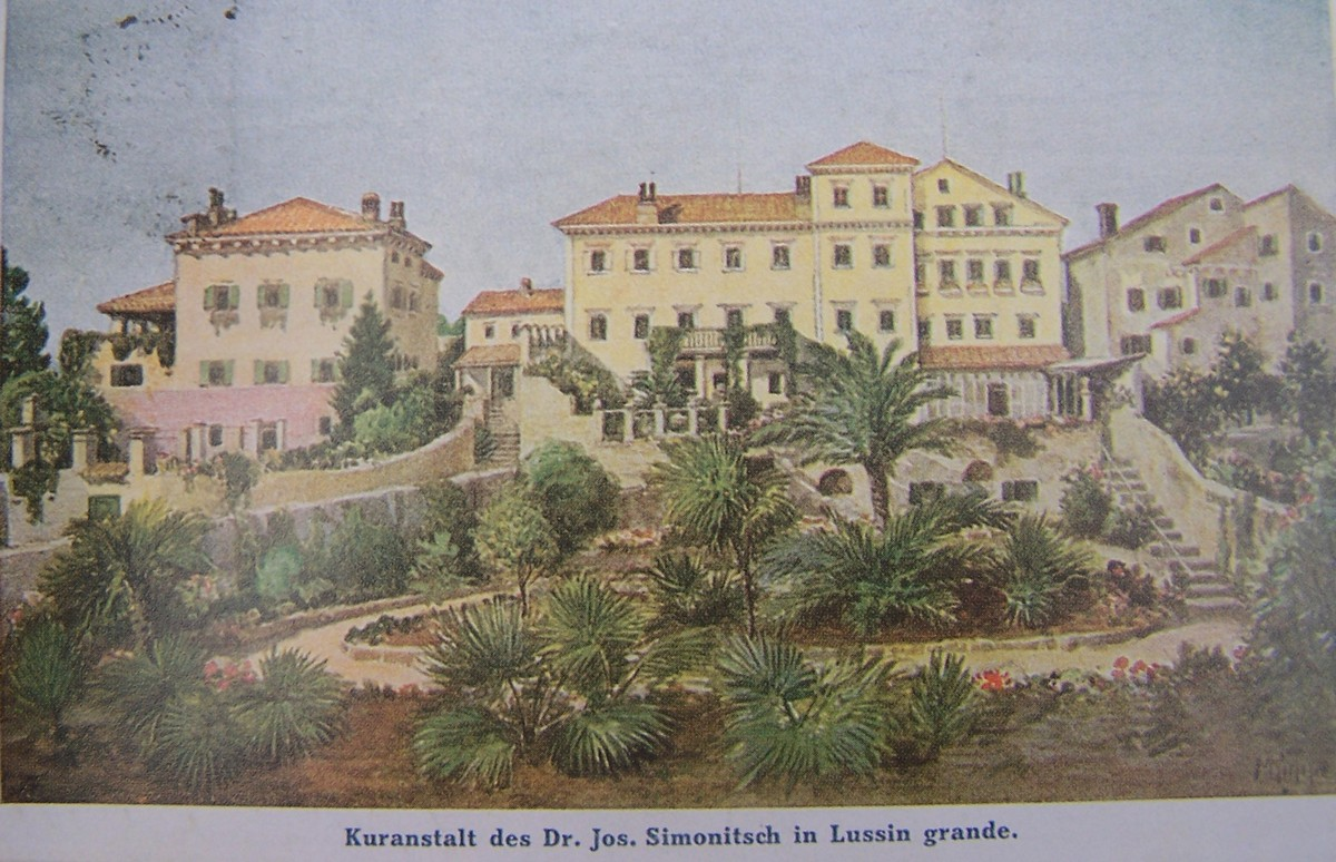 Veli Losinj Postkarte Kuranstalt Simonitsch 1912